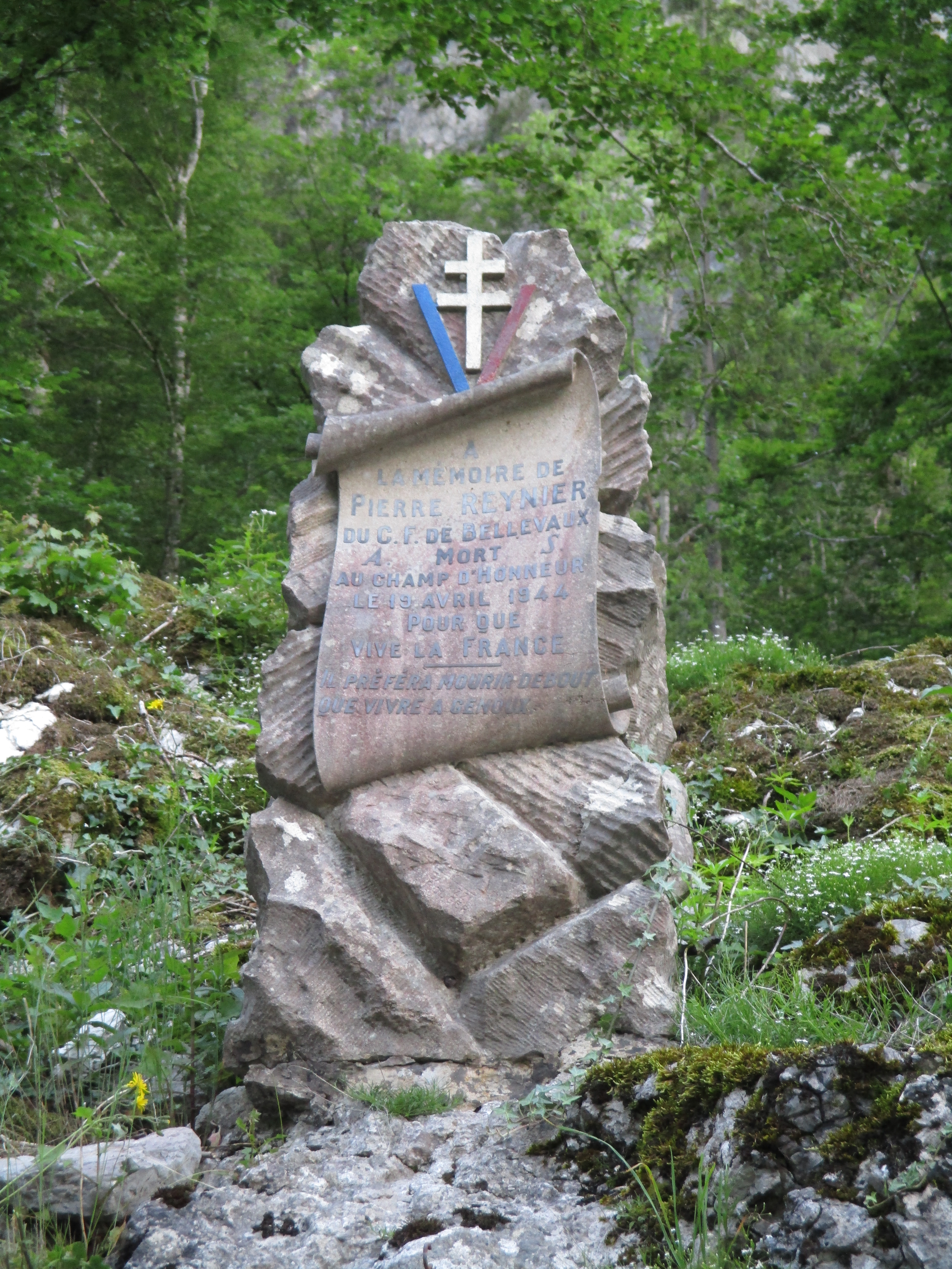 Le mémoriale de Layat, dédié au Soldat Pierre Jean Reynier habitant de Bellevaux, originaire de la Drome, est mort en 1944 pour la France.